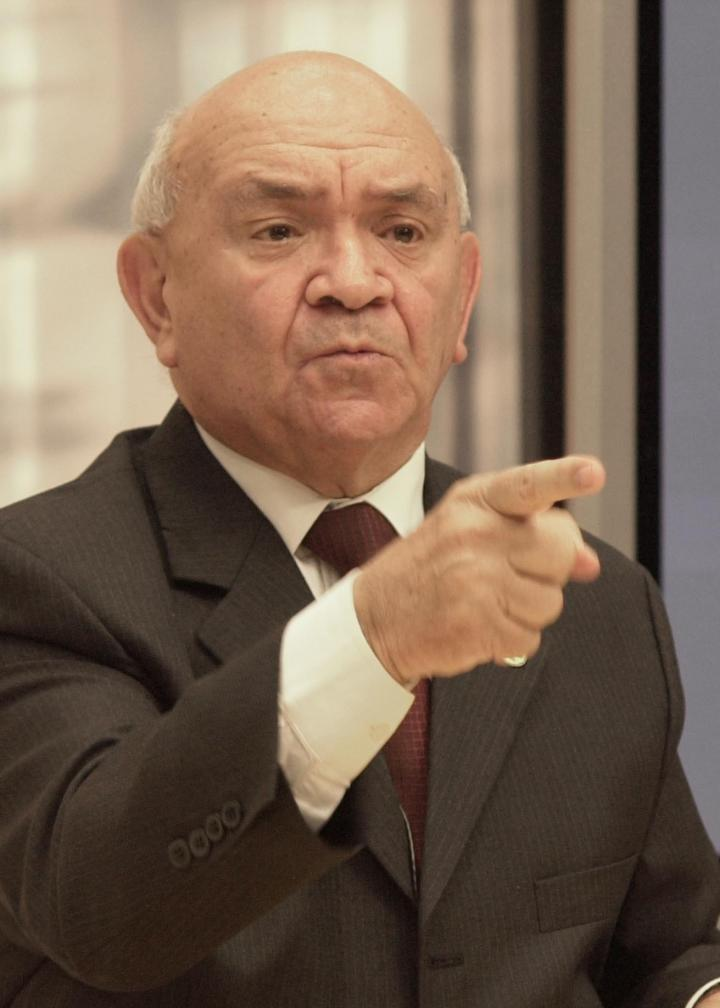 Brasília - O presidente da Câmara, Severino Cavalcanti, concede entrevista na Câmara dos Deputados. Foto: J. Freitas/ABr.